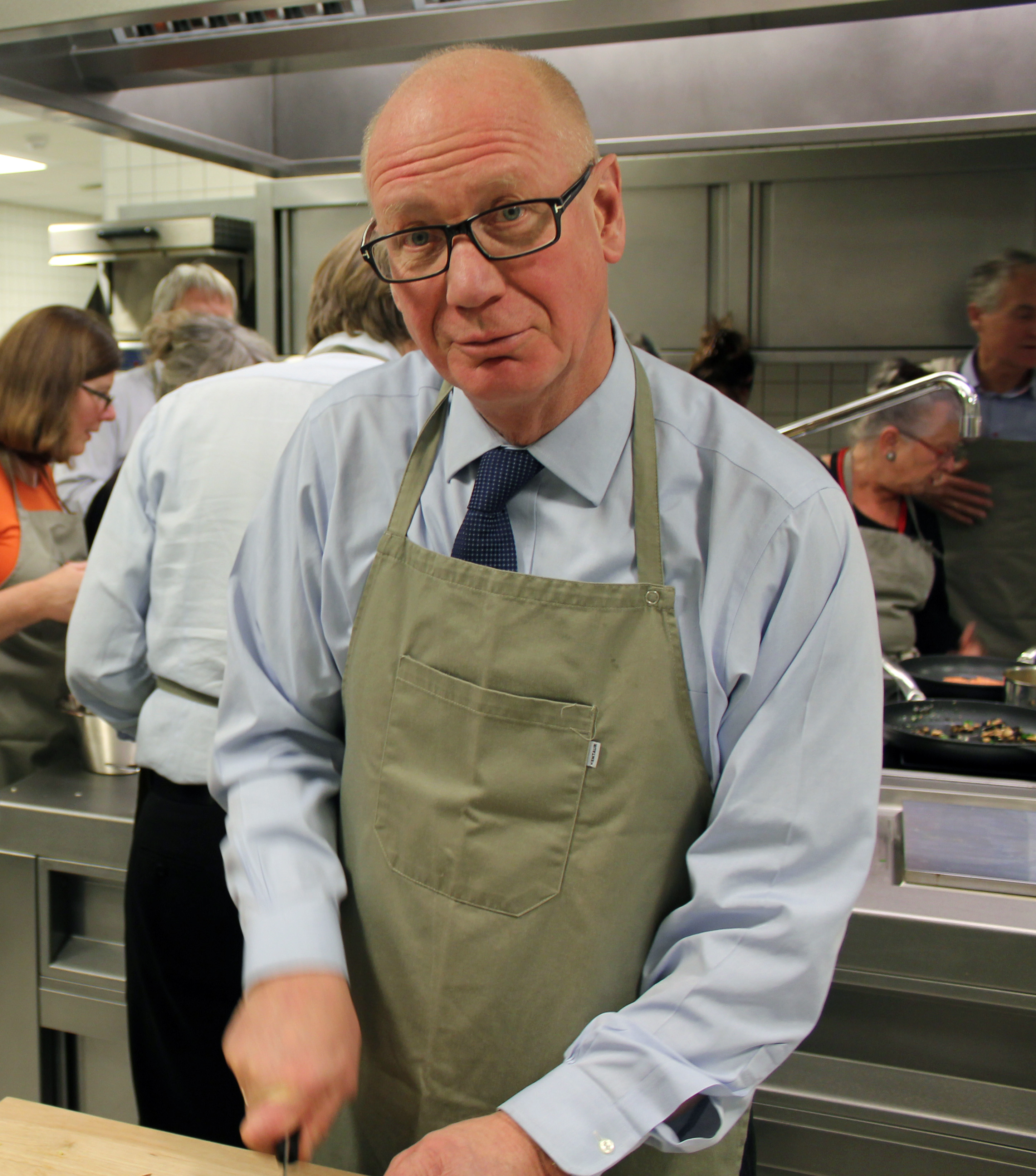 Trond Bakkevig åpner Lysebus nye kjøkken